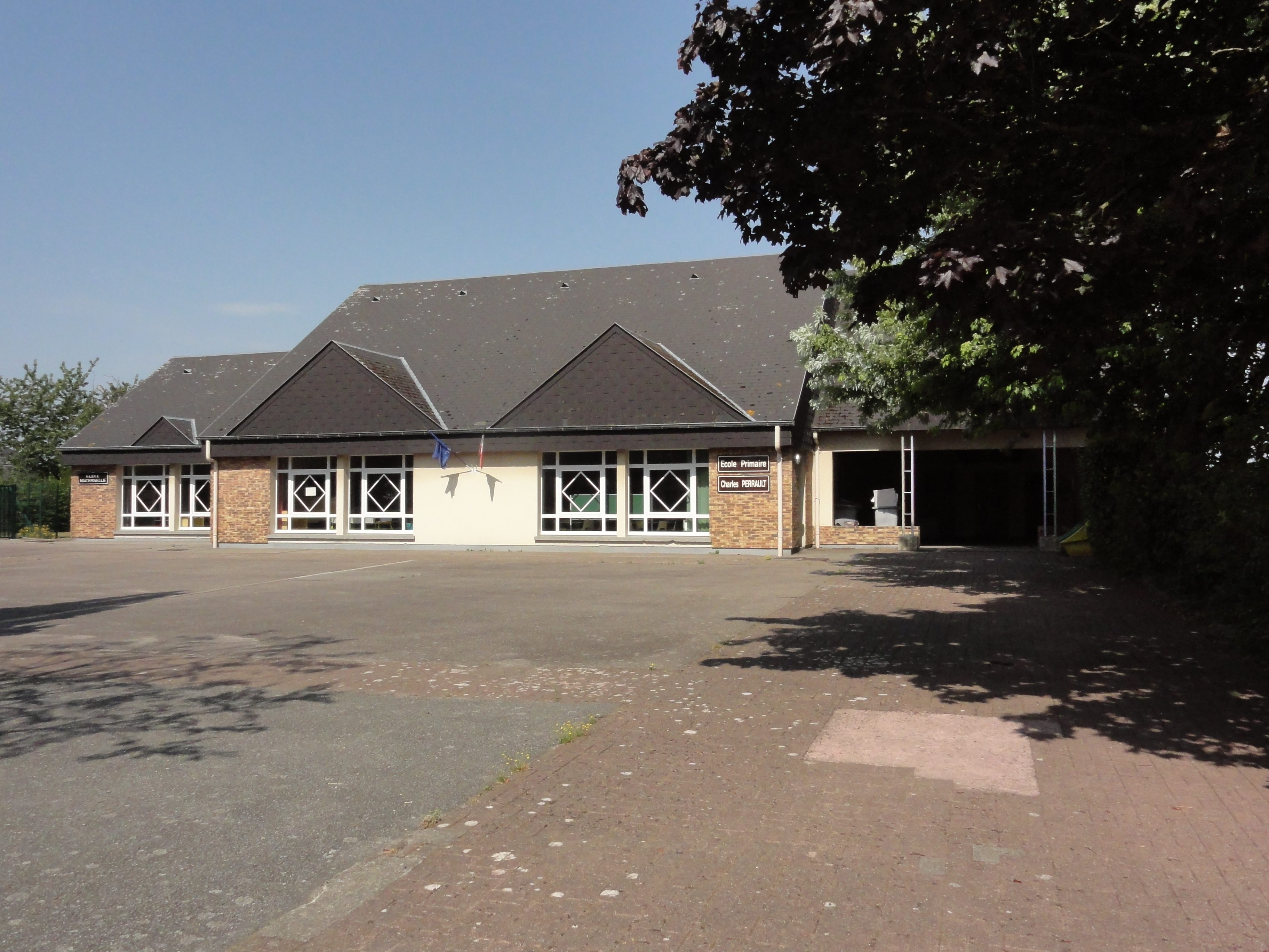 Touffreville-la-Cable (Seine-Mar.) école primiaire et maternelle